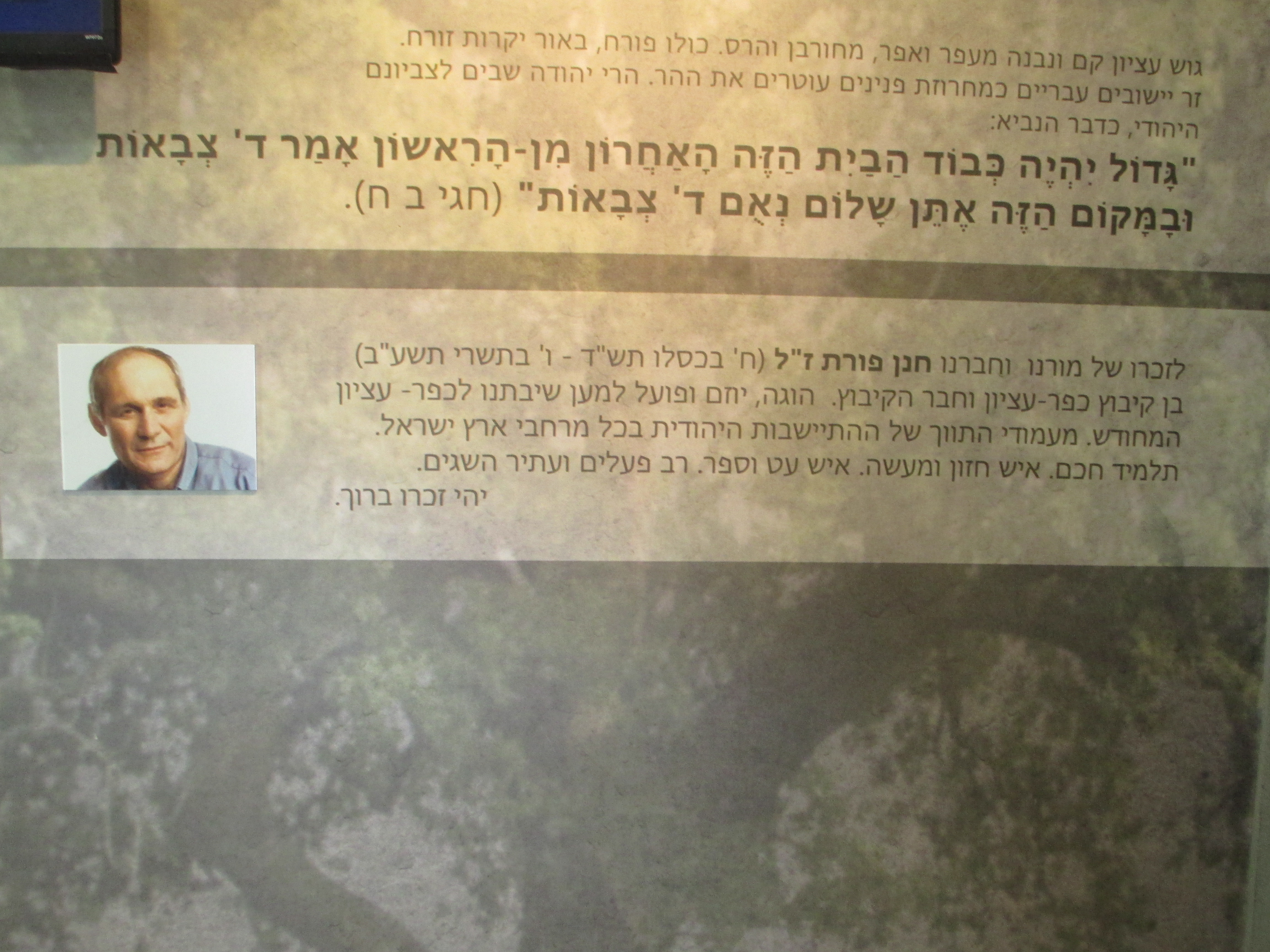 לוח זיכרון לחנן פורת בבית המורשת בכפר עציון